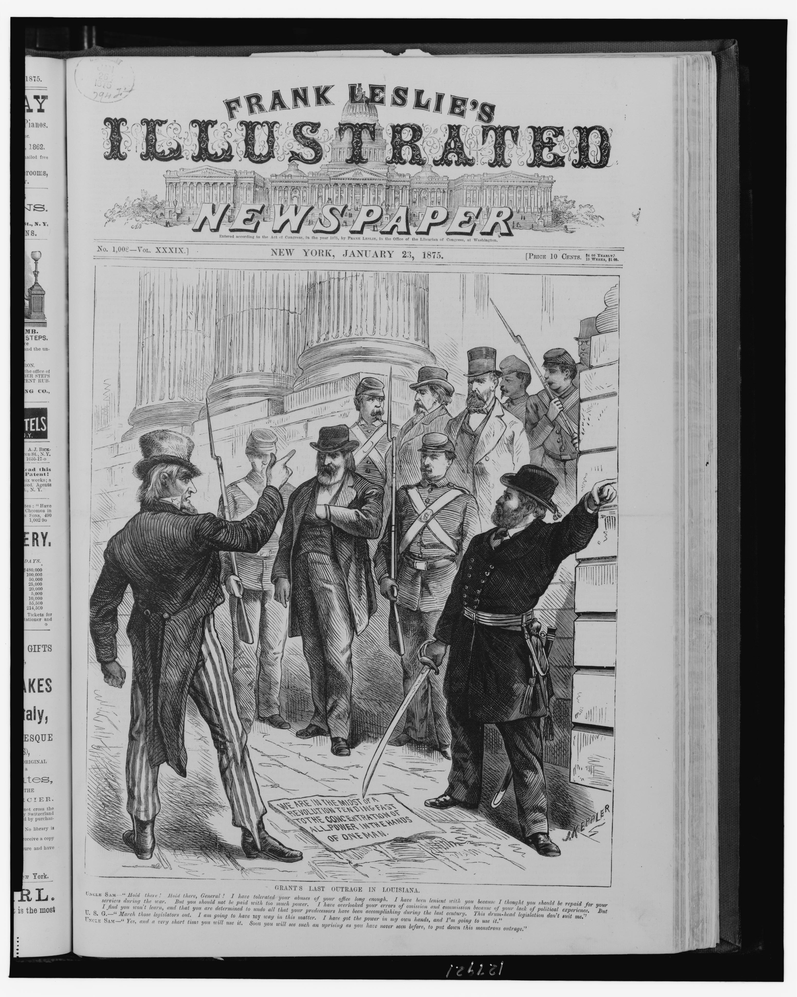 Cartoon: "Grant's last outrage in Louisiana"